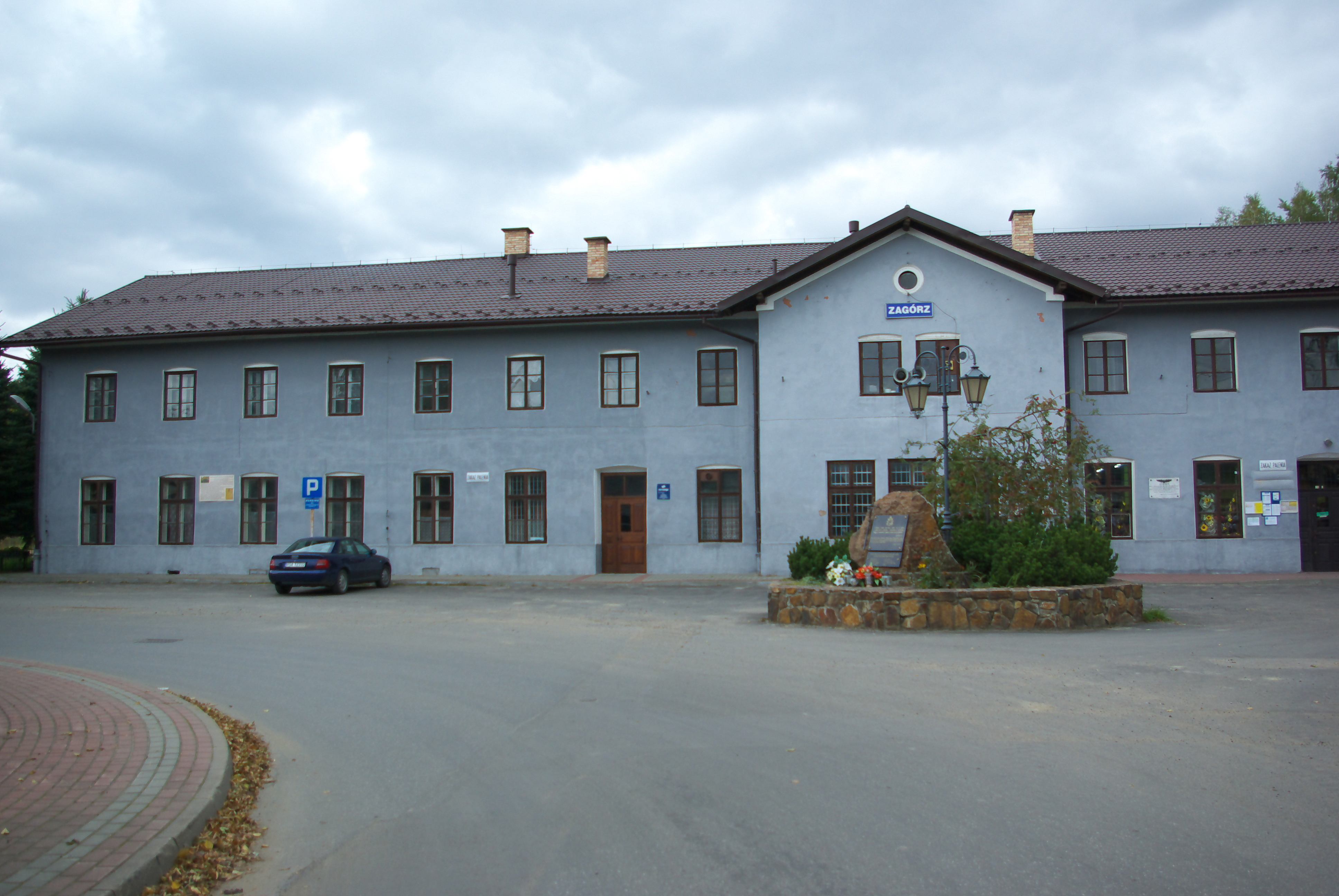 Budynek stacji kolejowej w Zagórzu